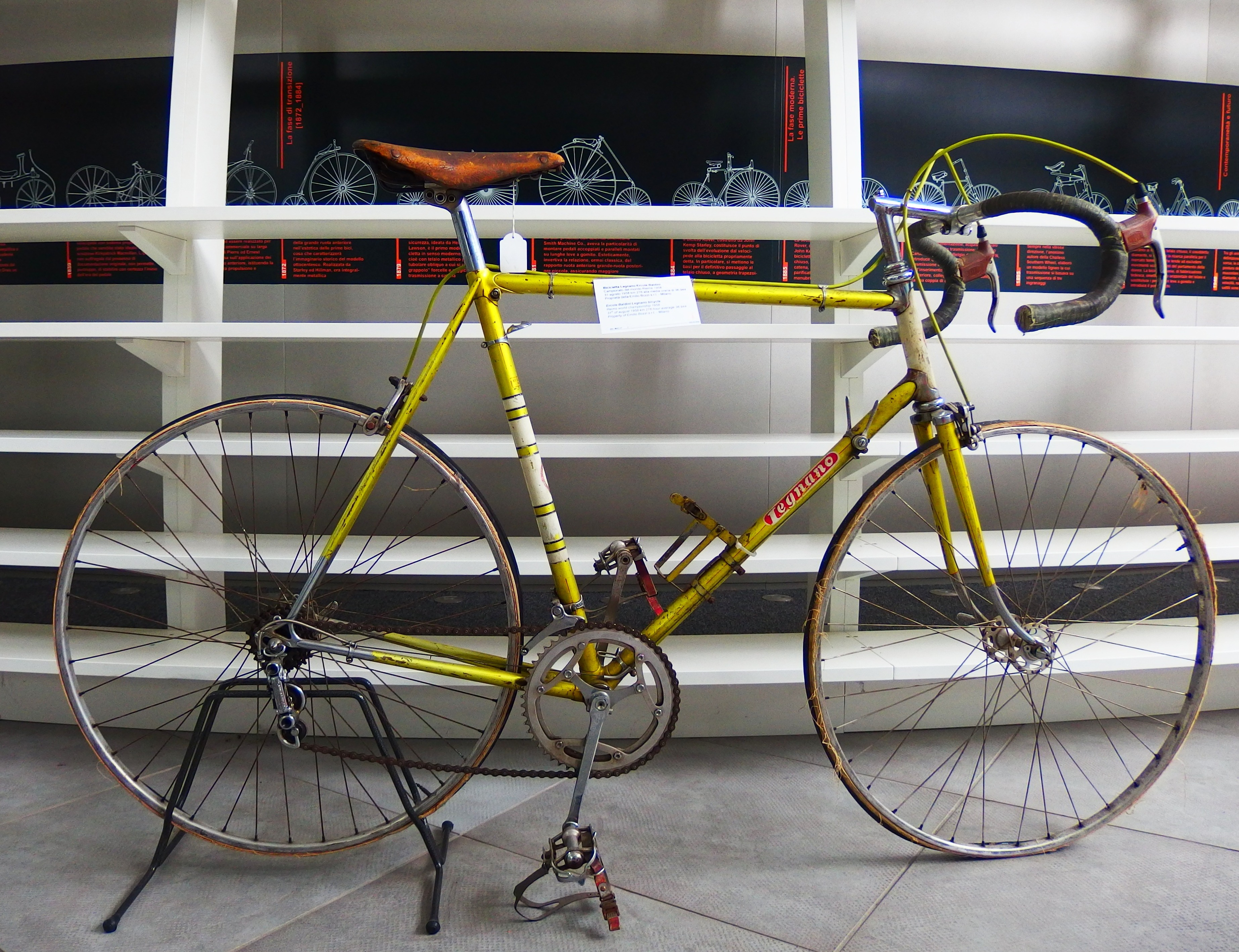 Fahrrad Marke Legnano von Ercole Baldini, mit dem er 1958 Straßen-Weltmeister wurde.